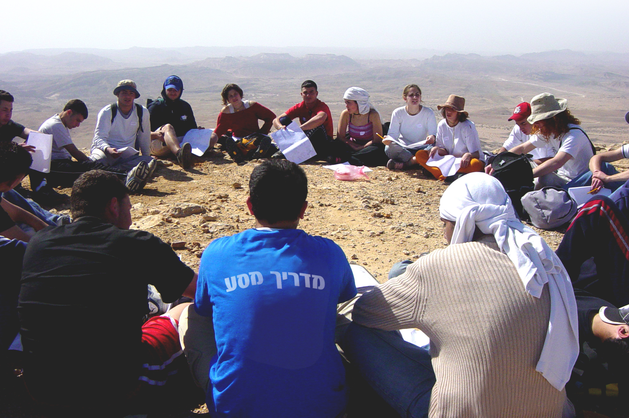 מעגל שיח במסע ישראלי